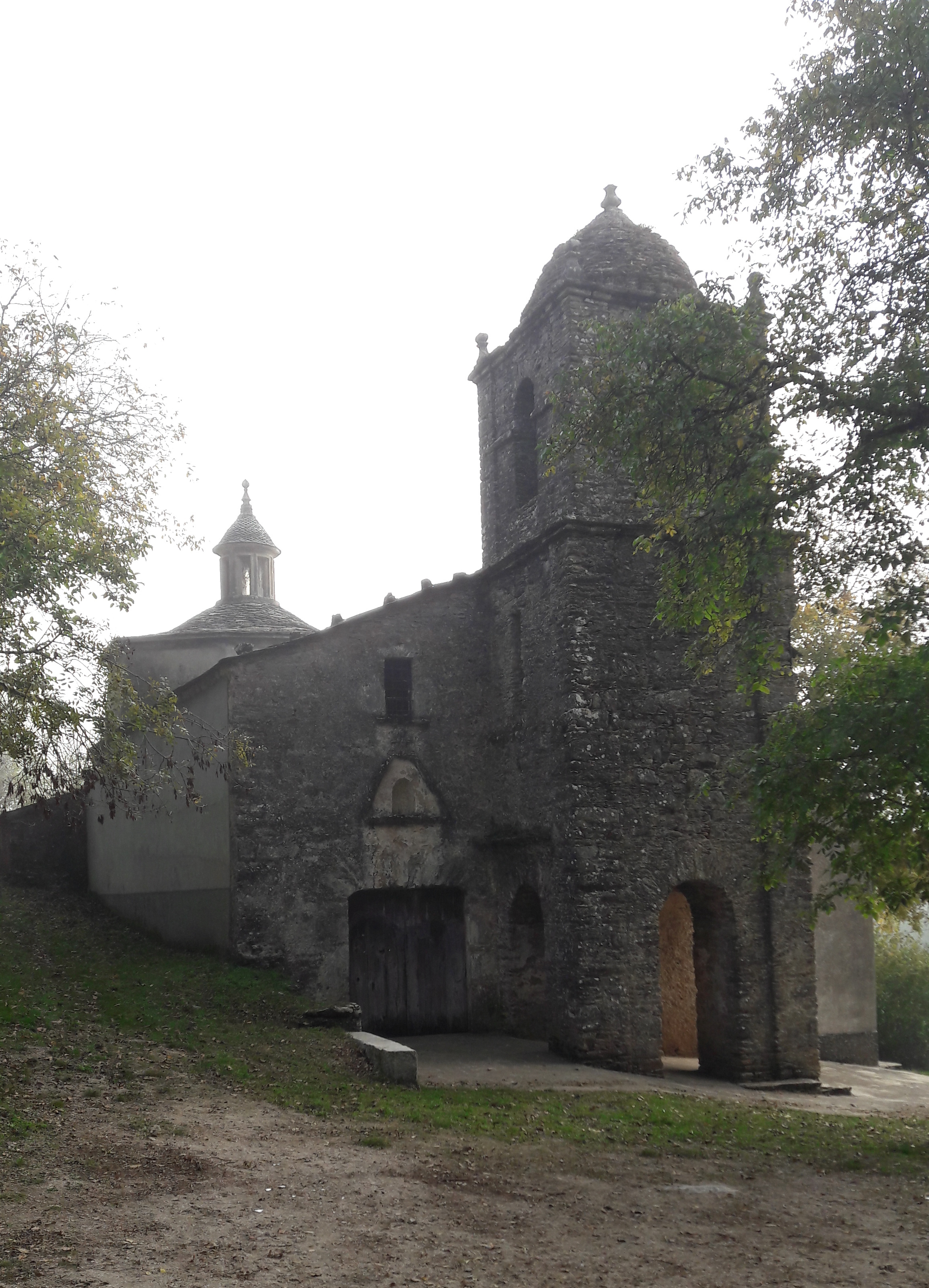 Igrexa de San Pedro de Cadoalla